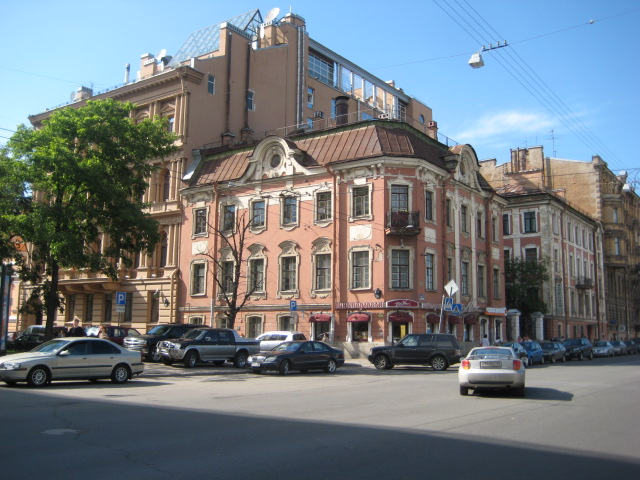 Угол Фурштадской и Потемкинской